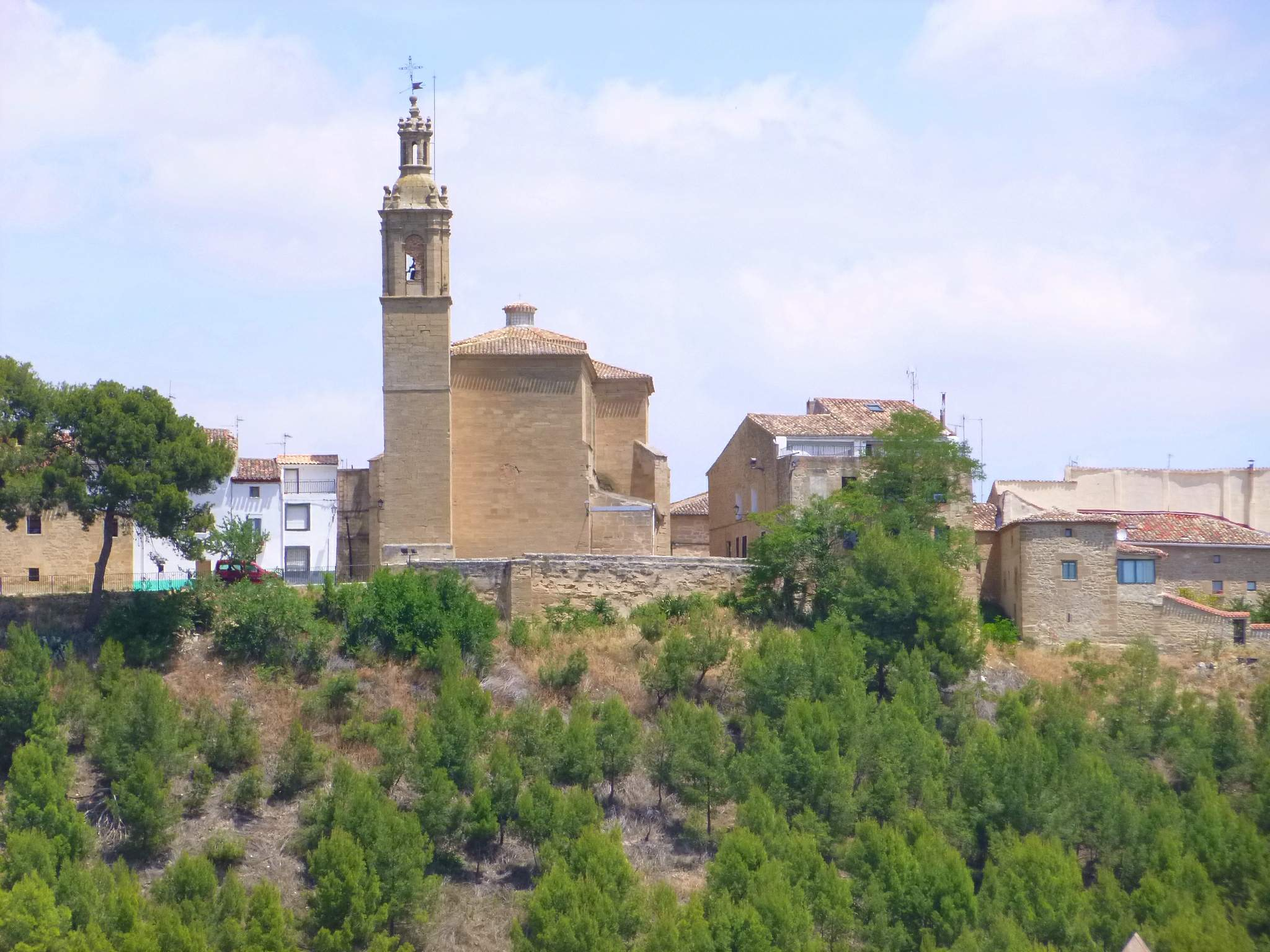 Sansol (Navarra) - Iglesia de San Zoilo